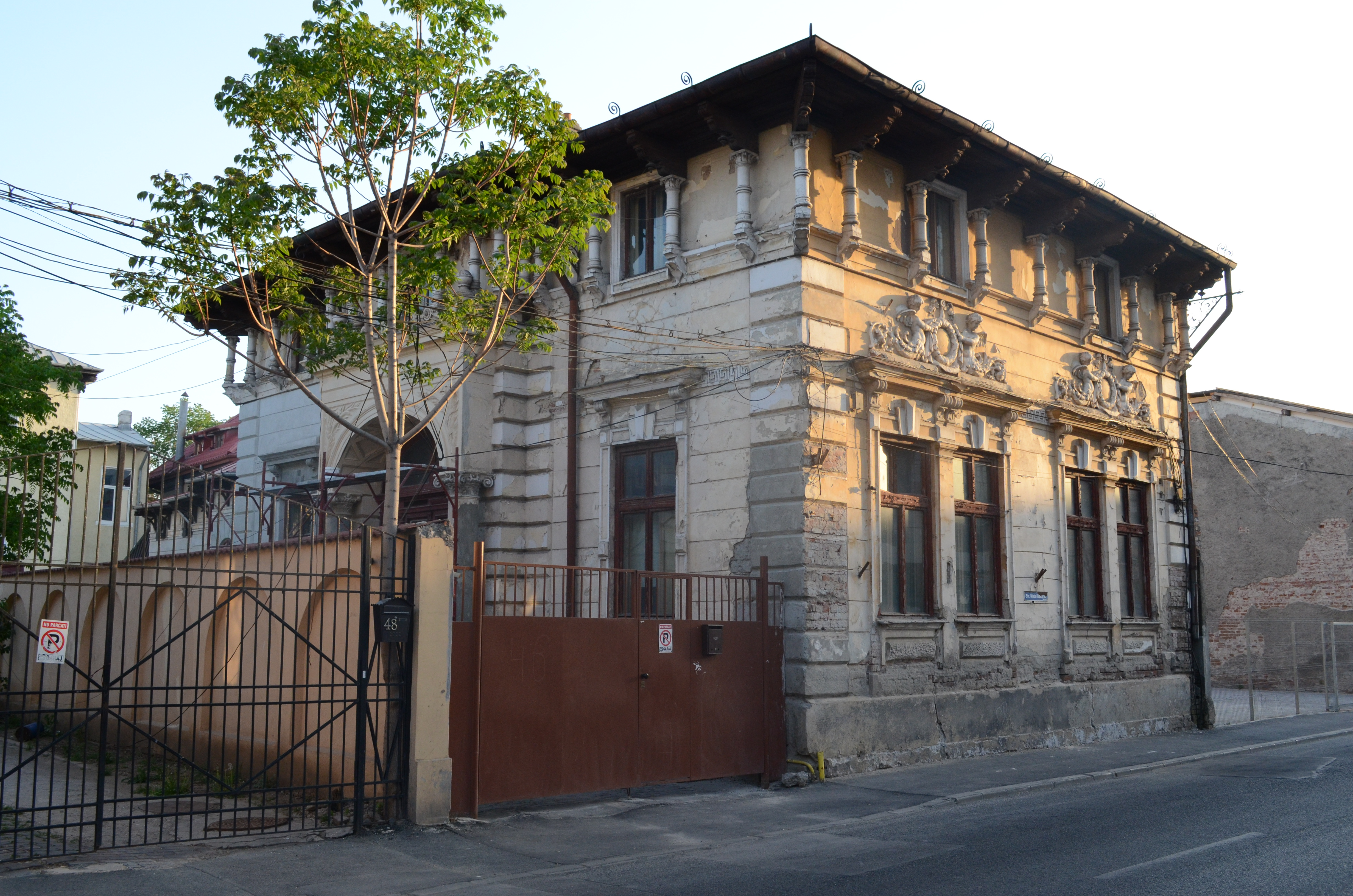 Casă, Strada Matei Basarab nr. 46, Sector 3, București